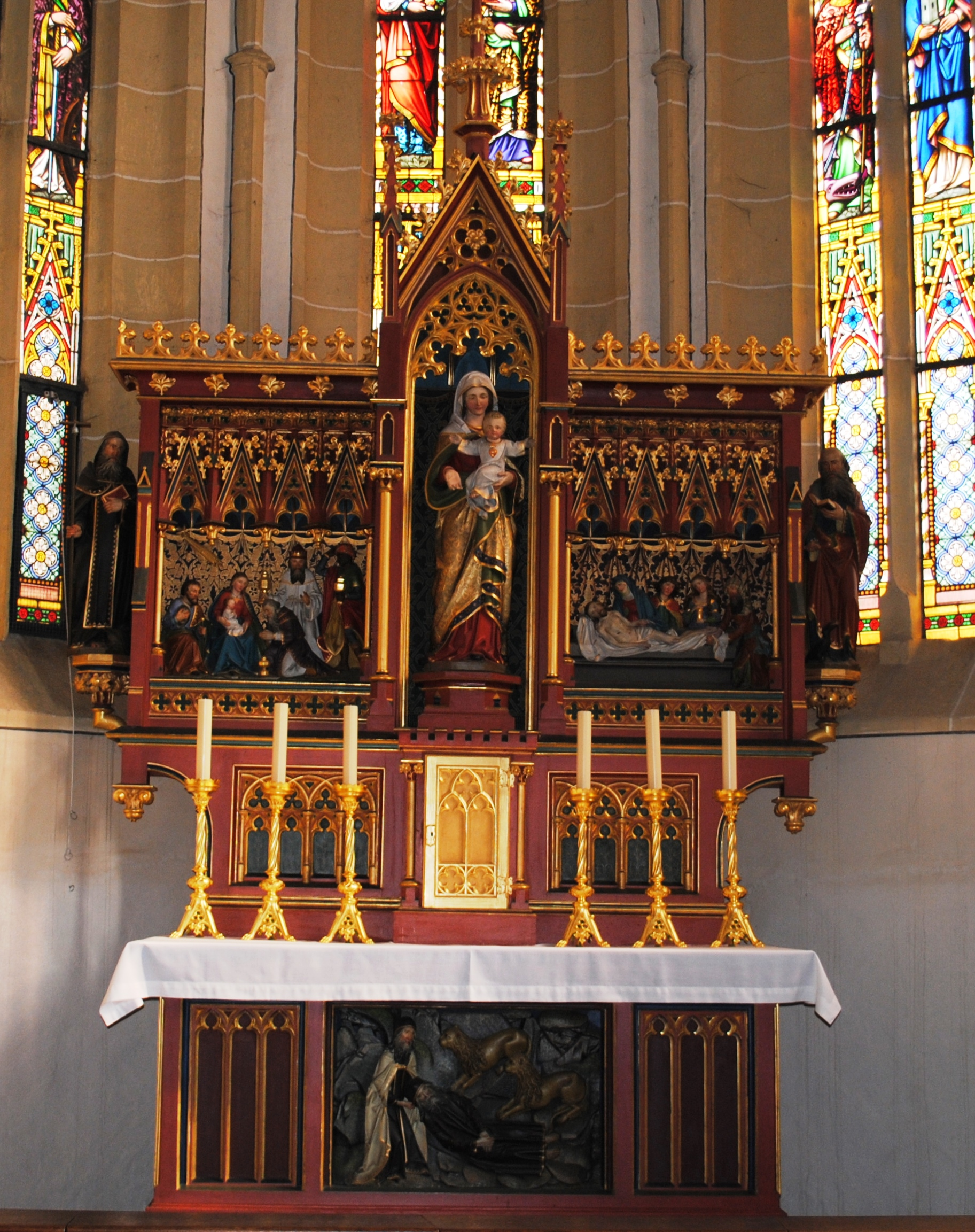 Altar, Antoniuskapelle, Großlangheim